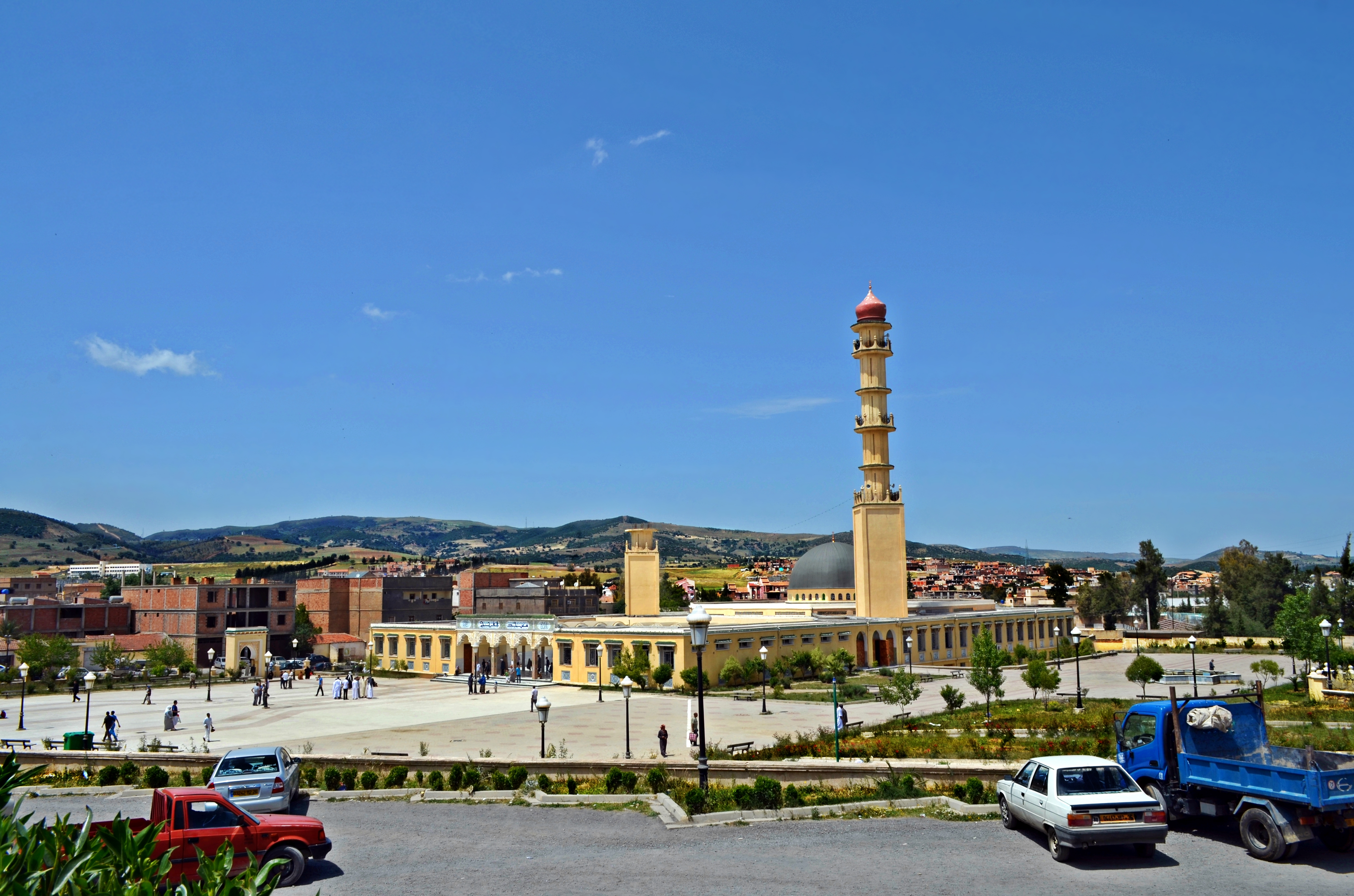 مسجد الفتح بالبرواقية، ولاية المدية، الجزائر